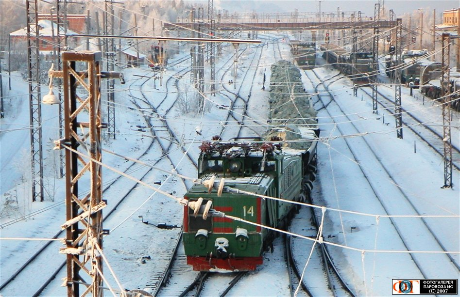 Промышленный электровоз (тяговый агрегат) ПЭ2М-134 с поездом на станции Восточная, Асбест